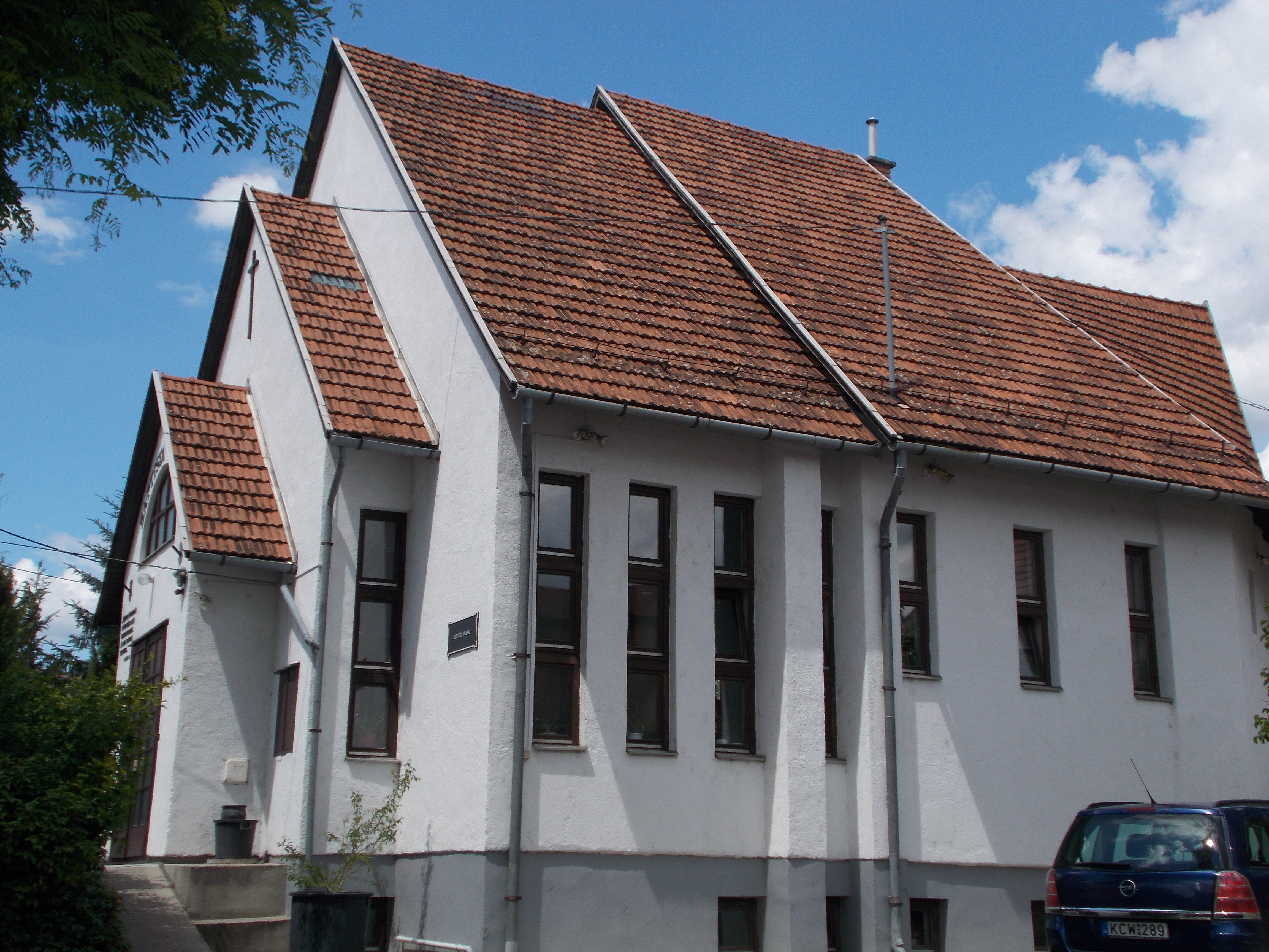 Baptista templom. Dél felől. - Szentendre, Rákóczi Ferenc utca 27